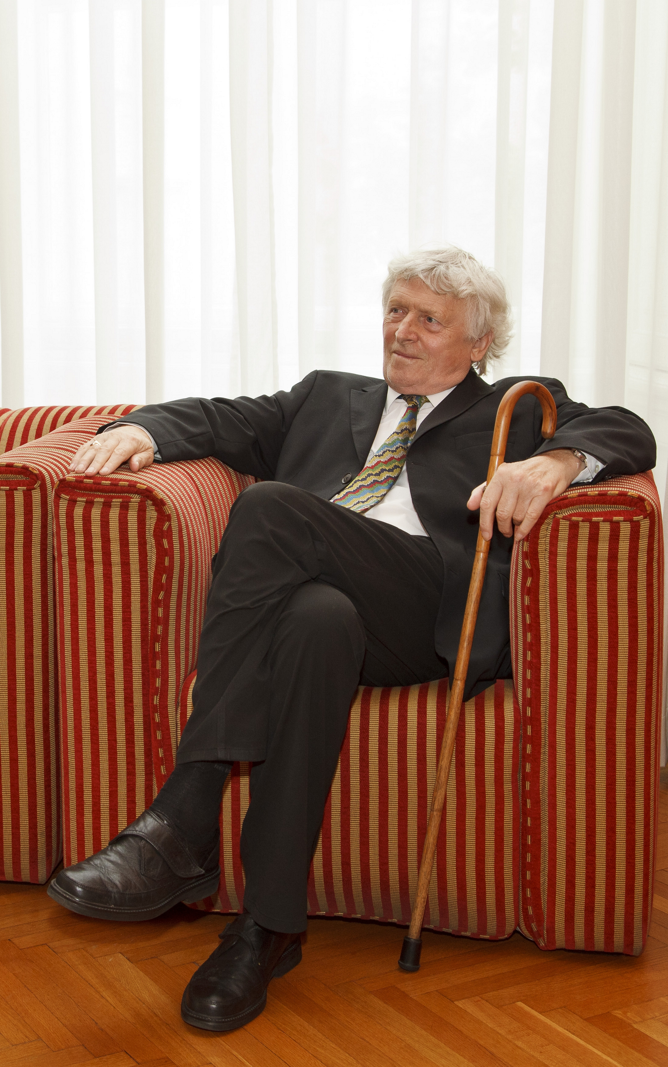 Alfred Kolleritsch, 8. Juli 2011; Foto von Gerd Neuhold: das Foto wird mit schriftlicher Erlaubnis des Fotografen vom 30. Juni 2013 hochgeladen